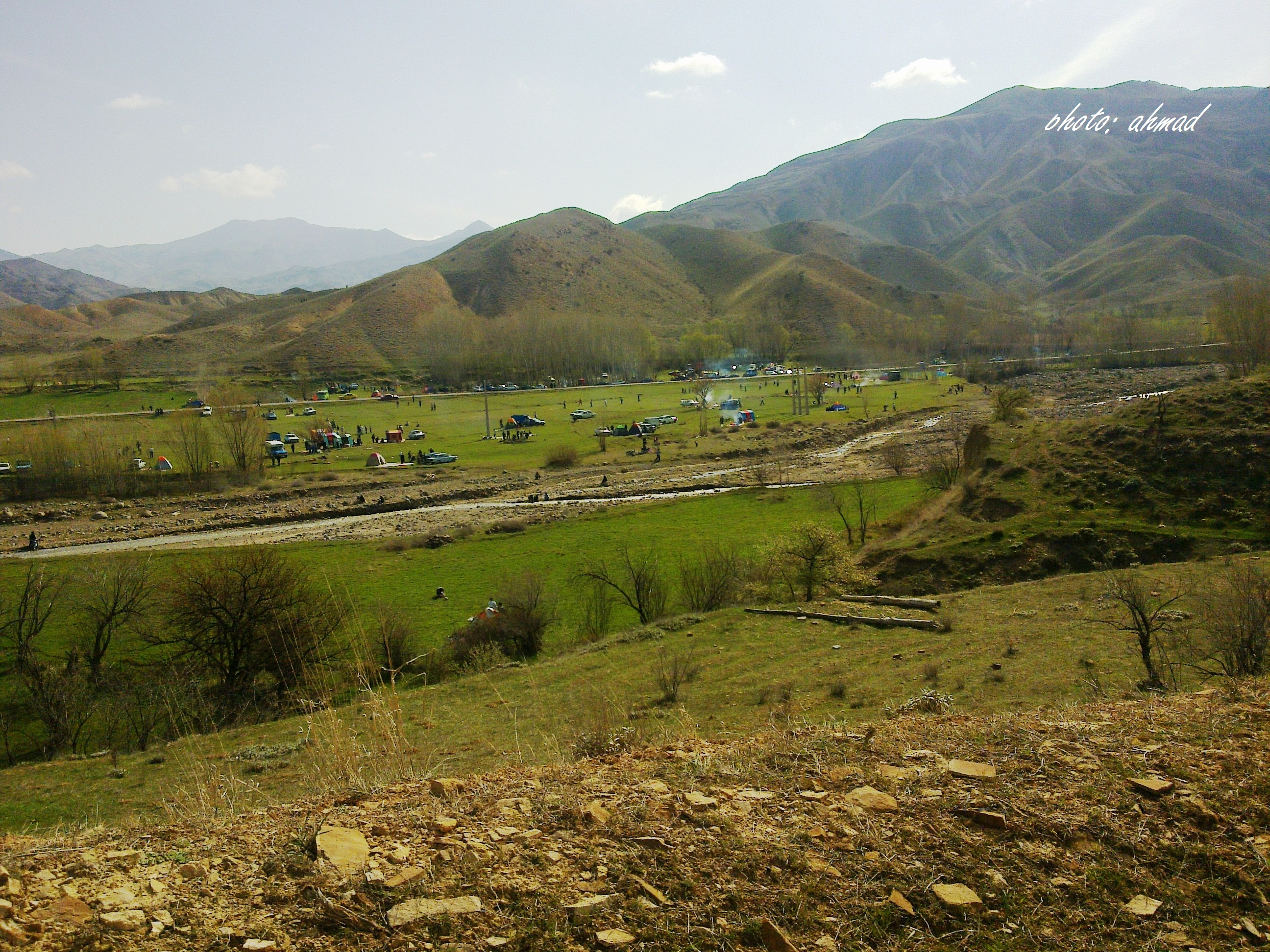 دره رود جوشین (جوشون چایی)در سیزده به در سال 89